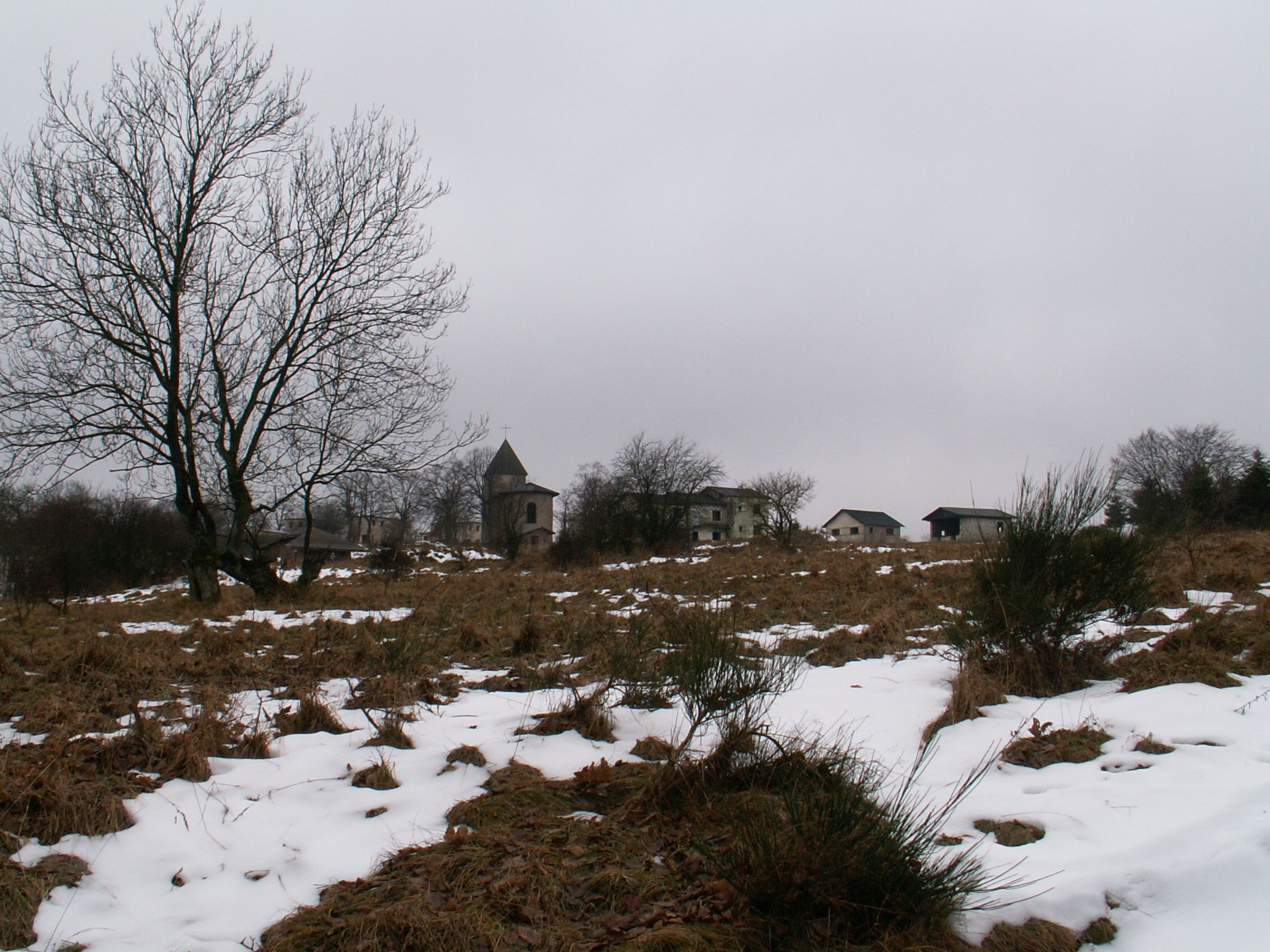 Truppenübungsplatz Vogelsang Wüstung Wollseifen, erhaltene Kirche des geräumten Dorfes mit vom Belgischen Militär neu errichteten Kulissenhäusern, mit und in denen der Häuserkampf geübt werden konnte. Vom alten Dorf steht nur noch die Kirche, das Schulgebäude, ein Trafohäuschen und eine etwas außerhalb liegende Kapelle.